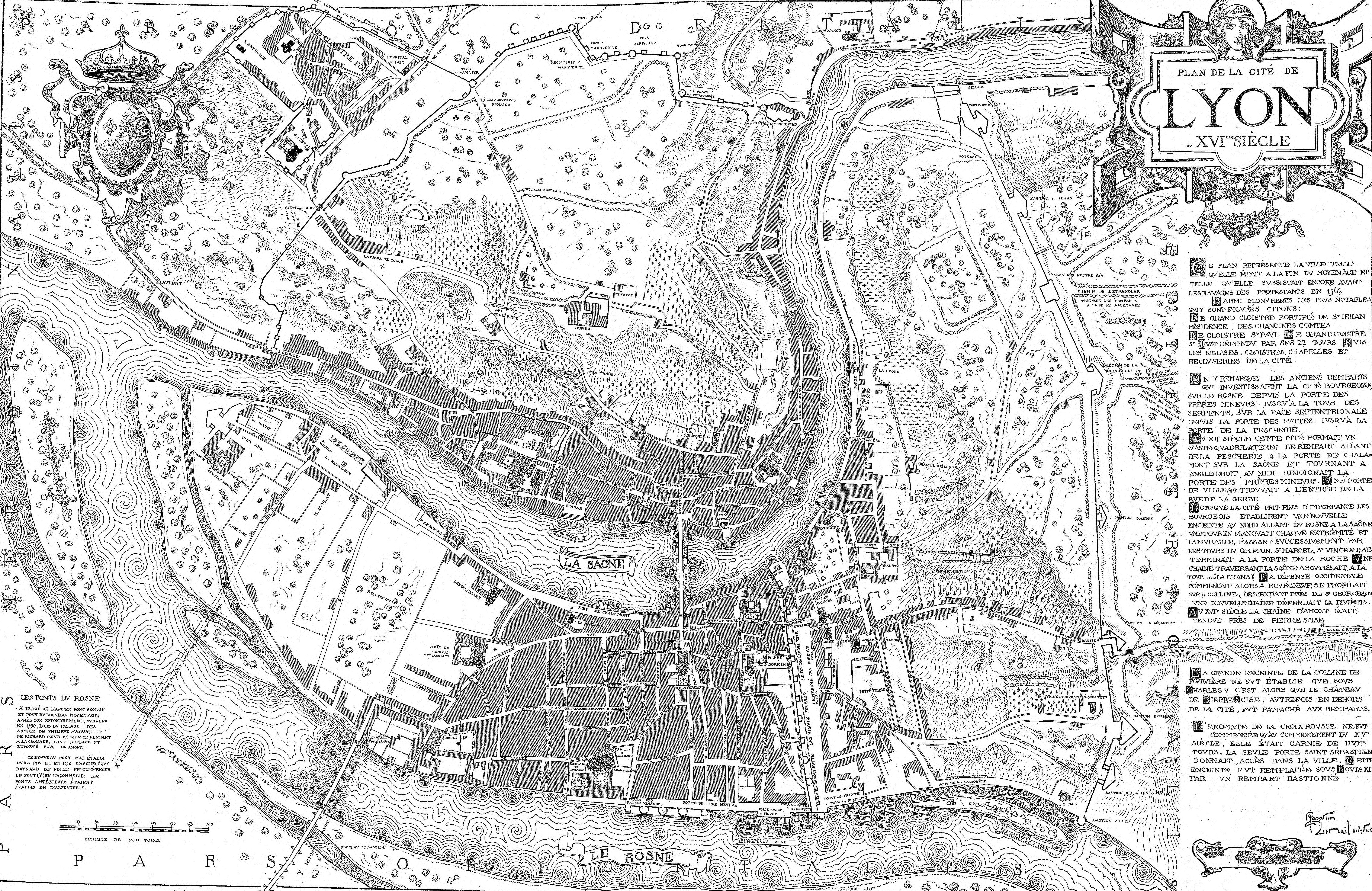 Illustration pour l'Histoire des églises et chapelles de Lyon